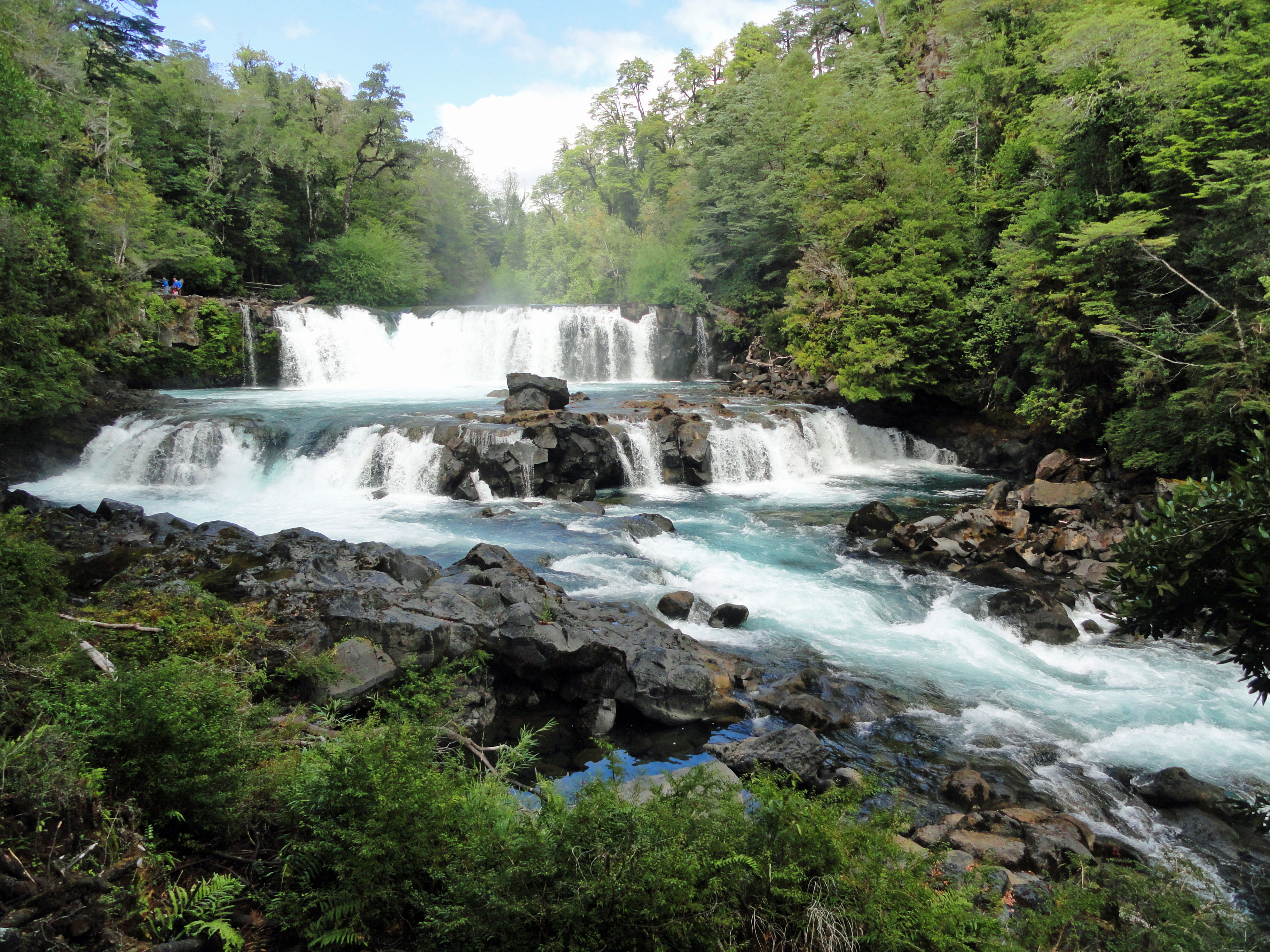 Salto de la Leona vistos desde el Mirador, Huilo Huilo